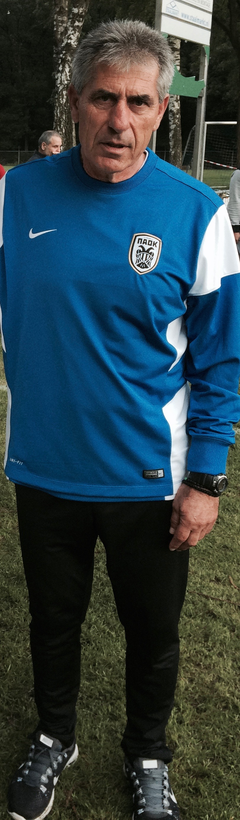 Trainer Angelos Anstasiadis im Jahr 2014 im Trainingslager in Osterbeek